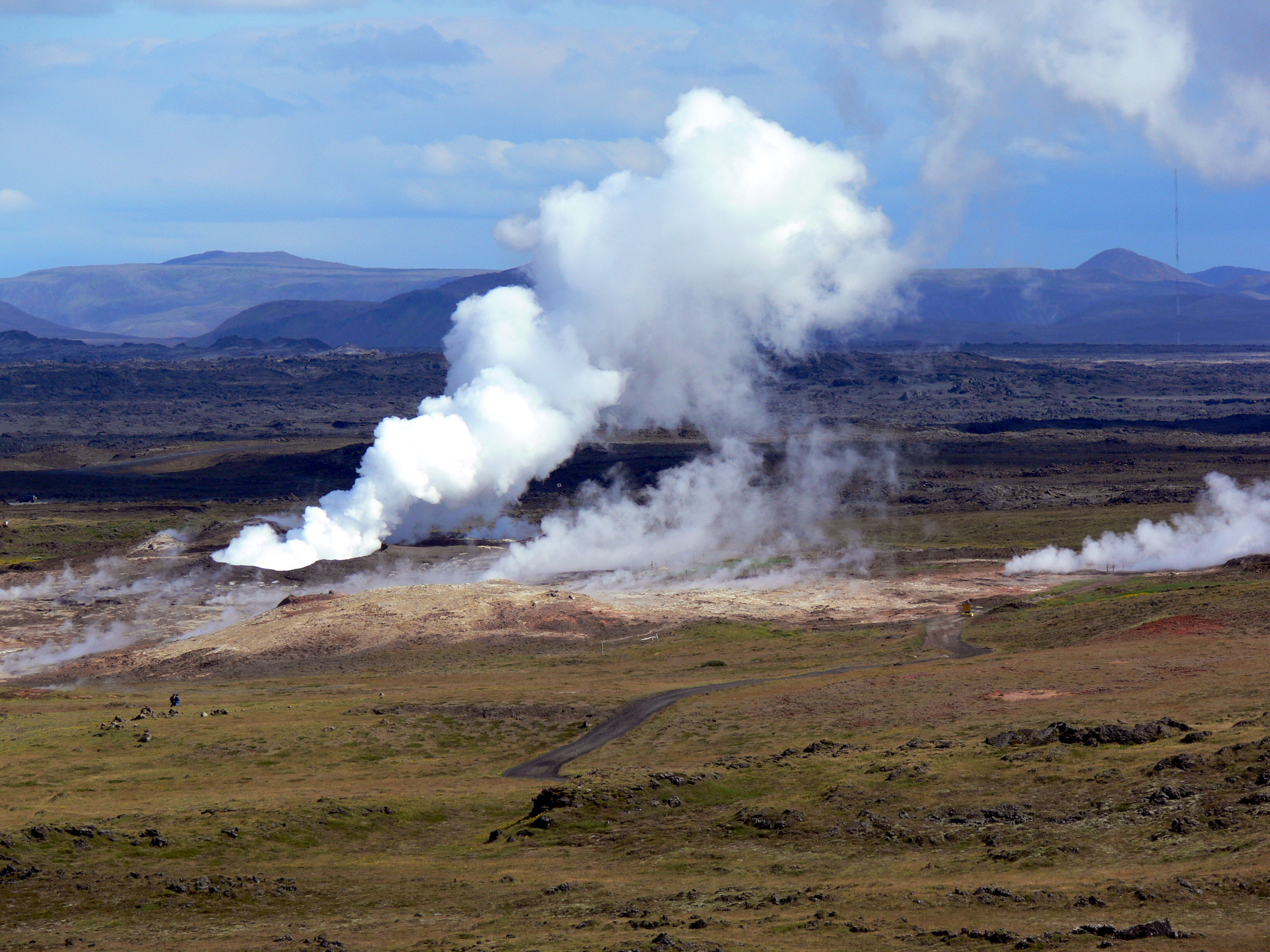 Thermalgebiet Gunnuhver auf Reykjanes.